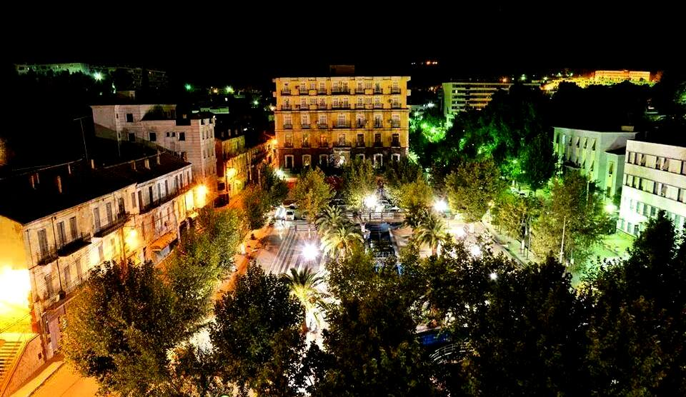 la ville de tiaret